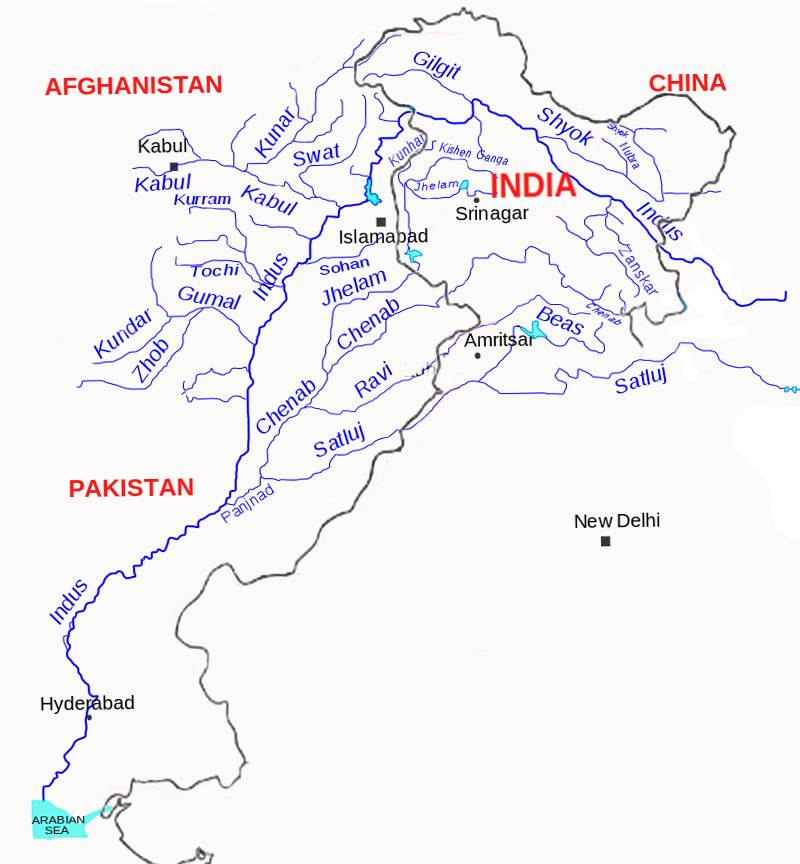 Indus River Basin